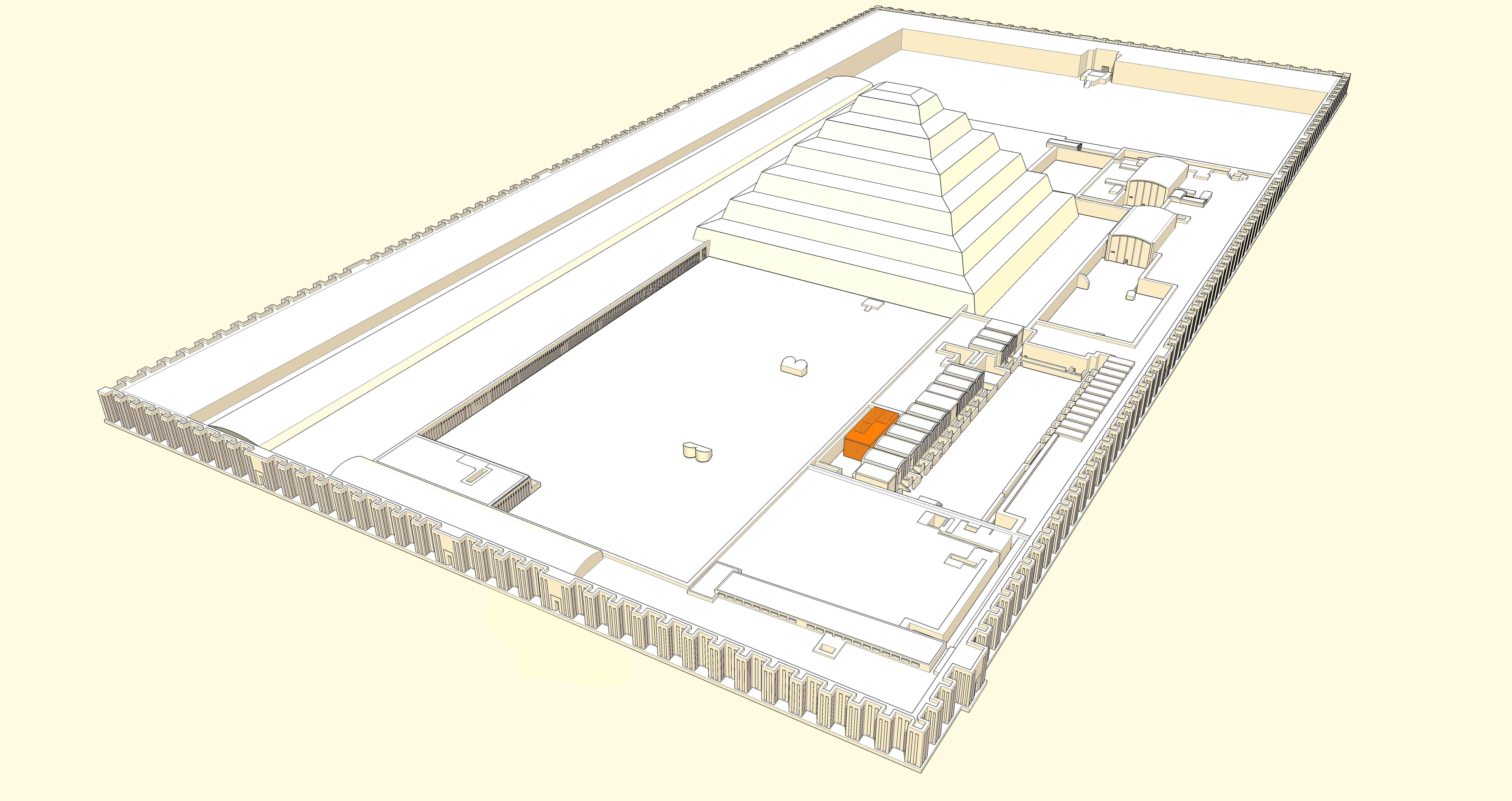 Position du temple T dans le complexe funéraire de Djoser